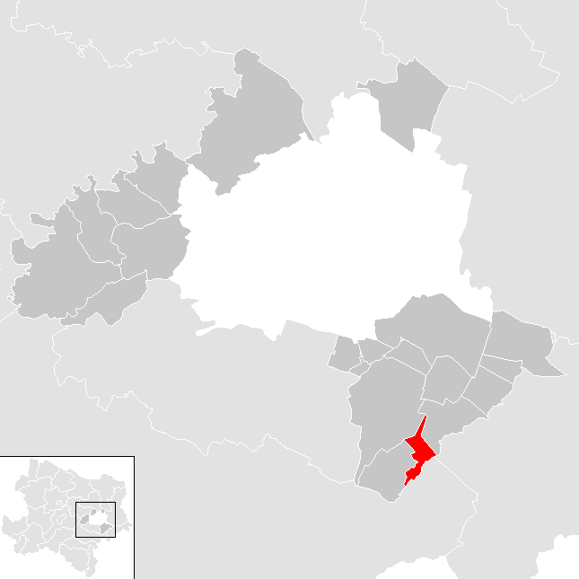 Bezirk Wien Umgebung